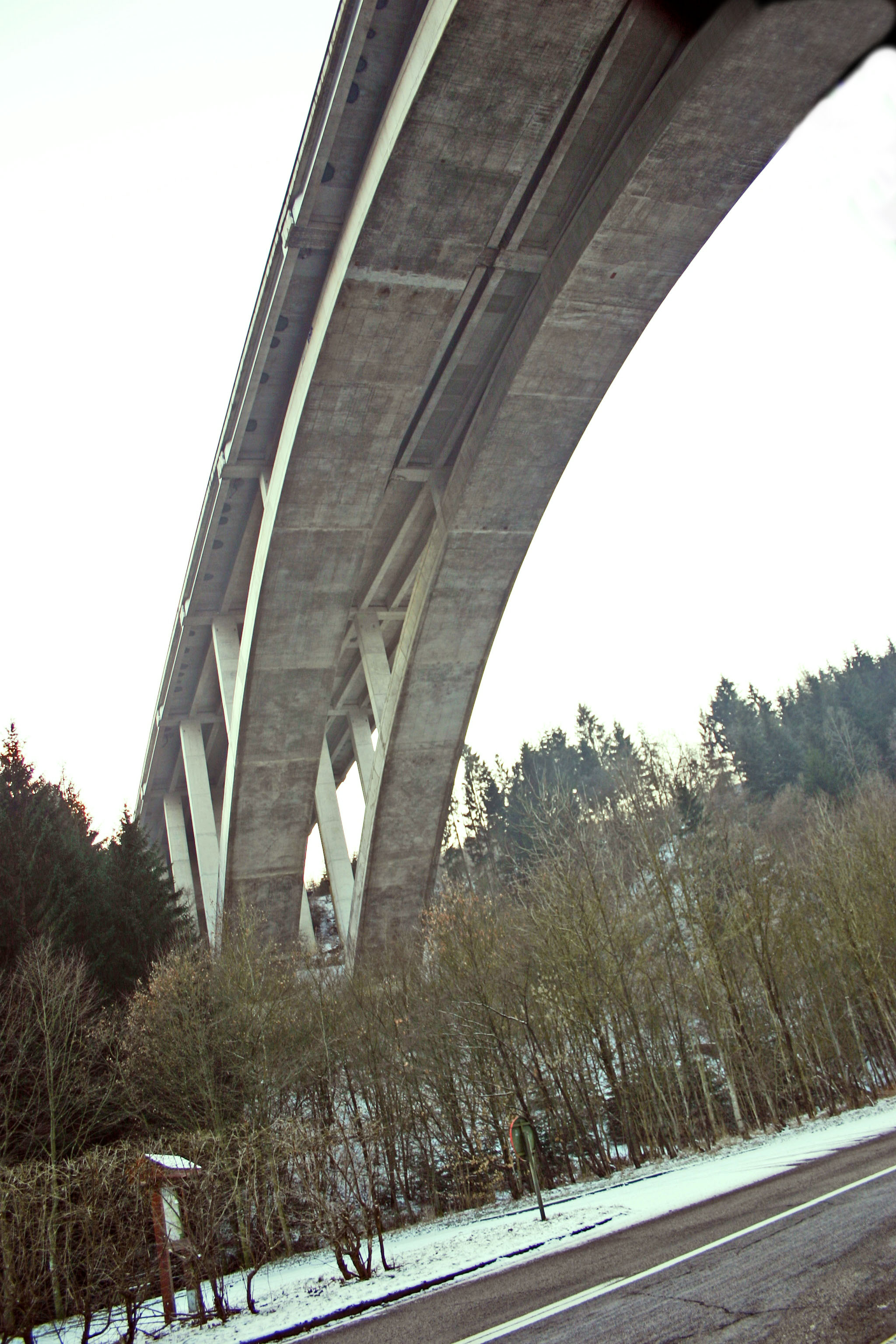 Viaduc vun Houffalize